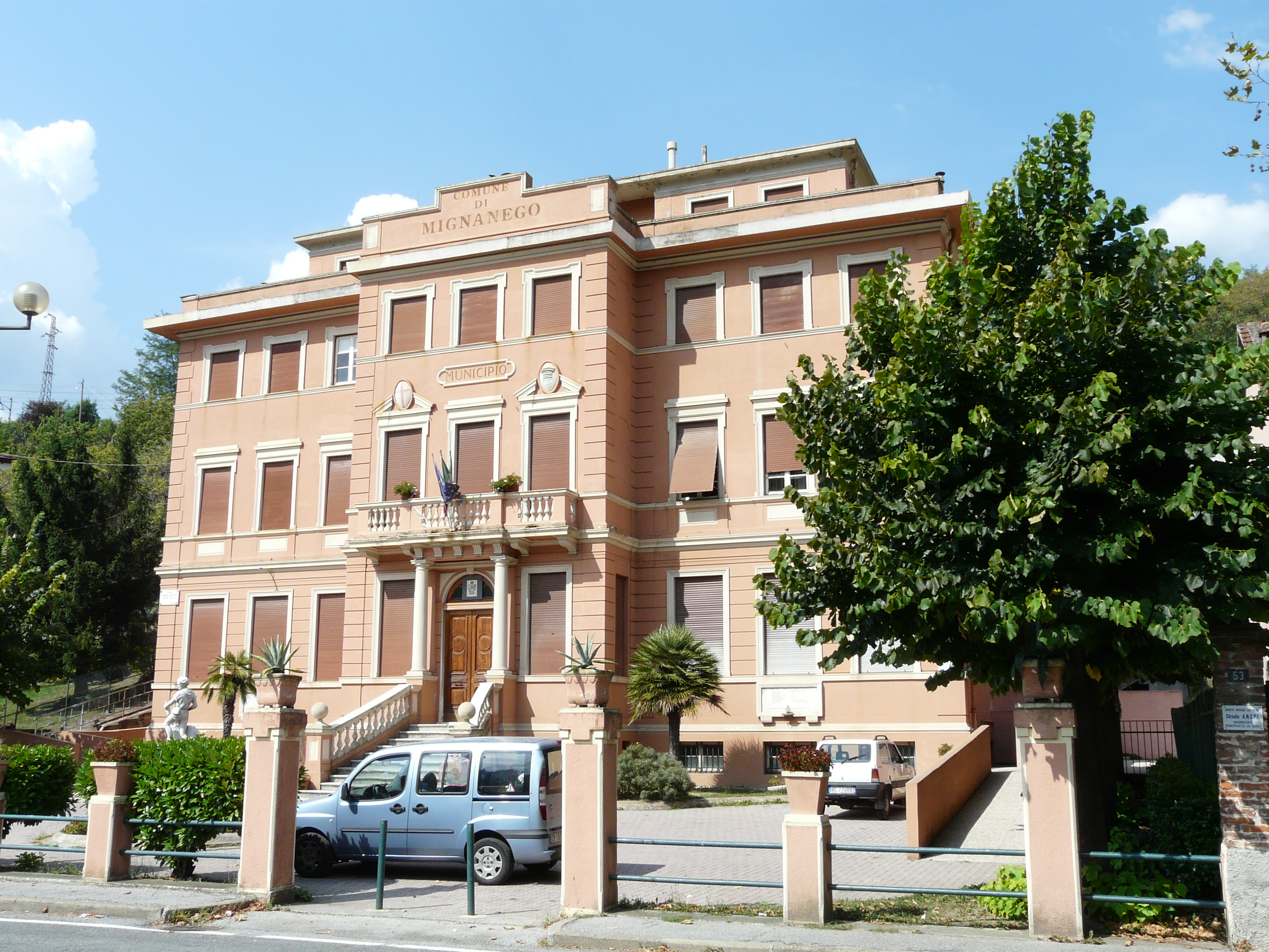 Municipio, Mignanego, Liguria, Italia